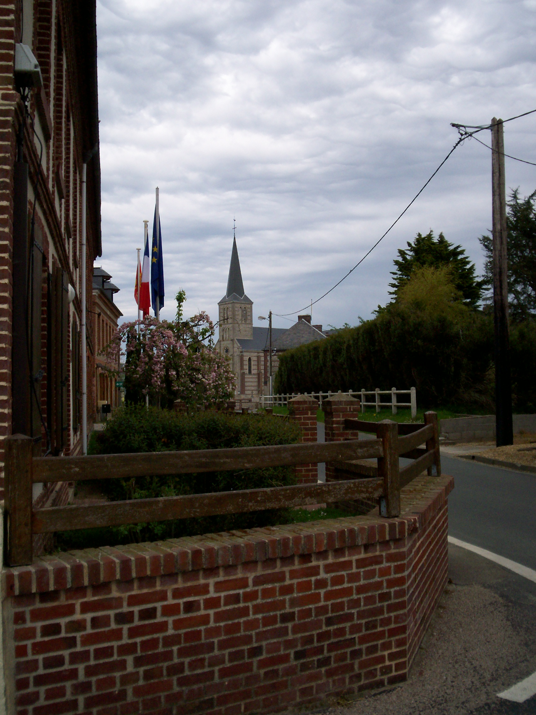 Vue de la mairie vers l'église